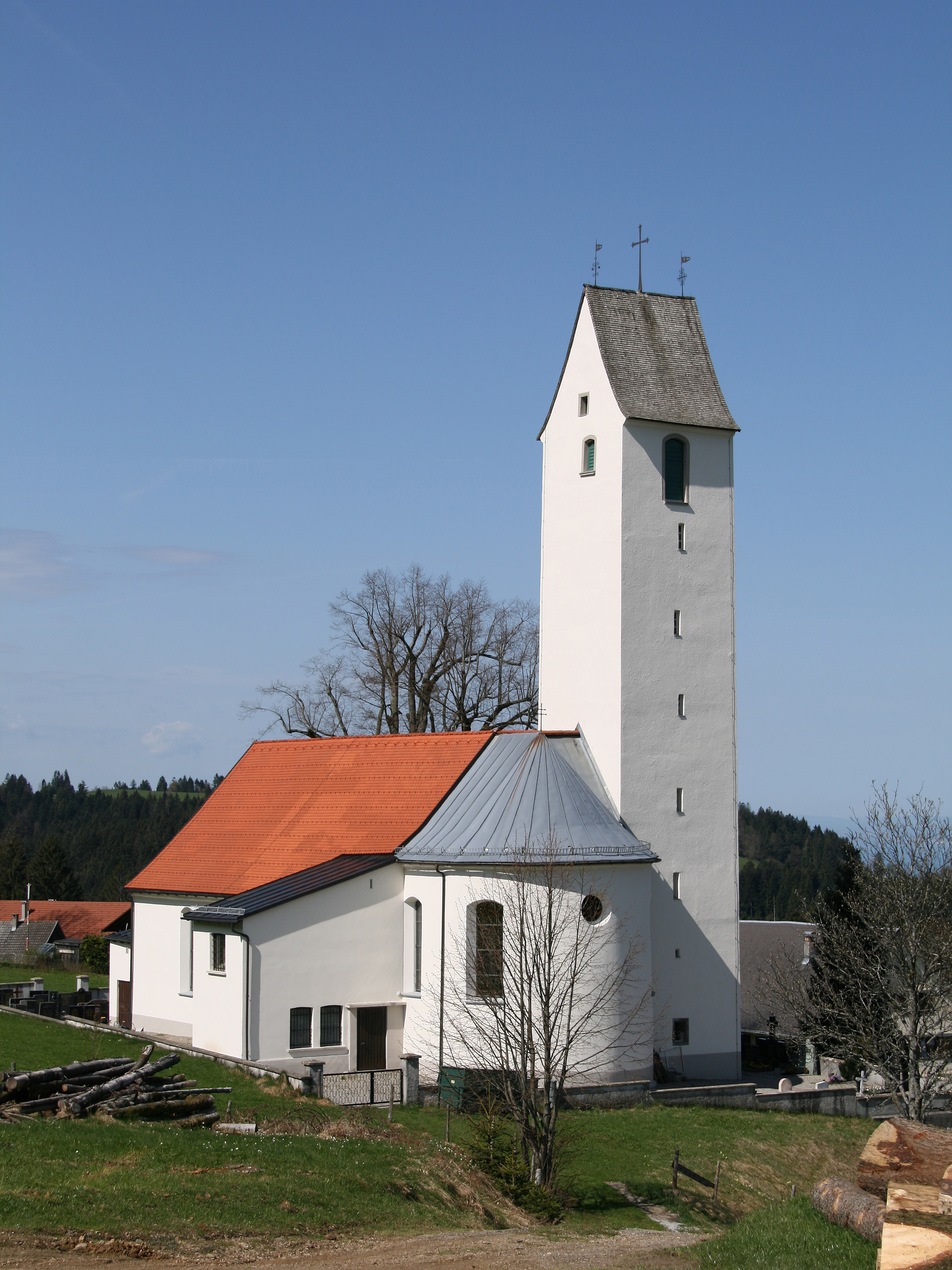 Pfarrkirche hl. Ulrich von Möggers in Vorarlberg von Osten.